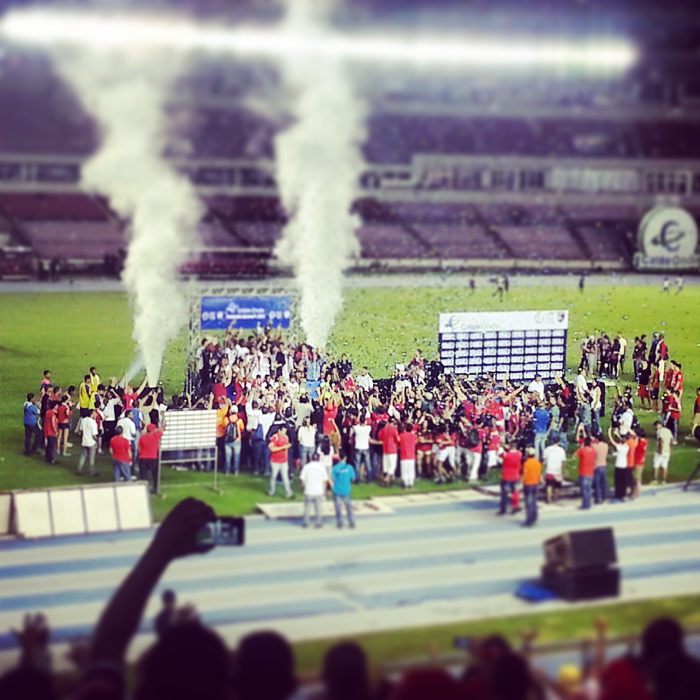 San Francisco FC Campeon Apertura 2014